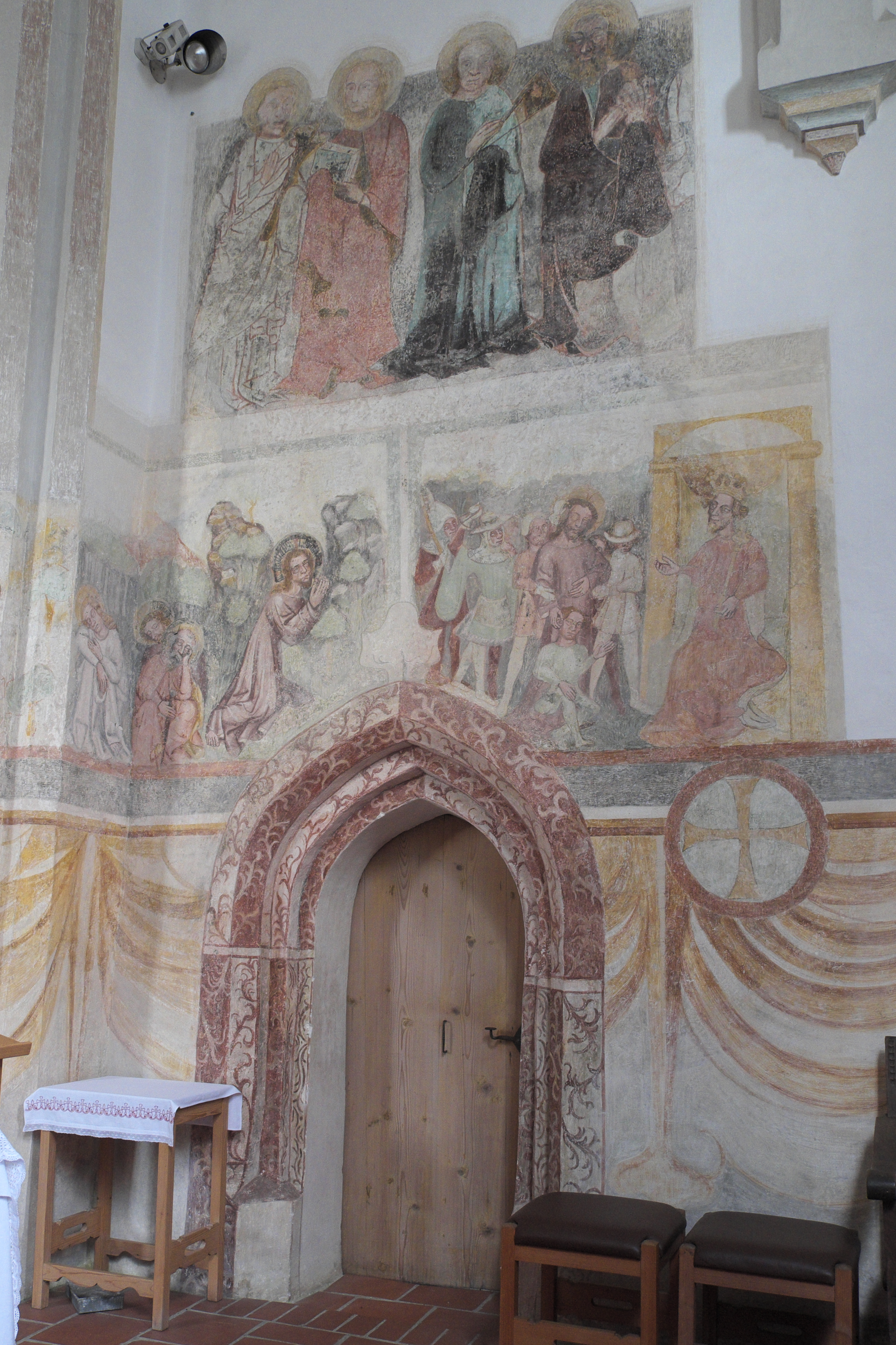 Katholische Filialkirche St. Remigius in Lappach (Sankt Wolfgang) im oberbayerischen Landkreis Erding (Bayern/Deutschland), Innenraum mit spätgotischen Wandmalereien